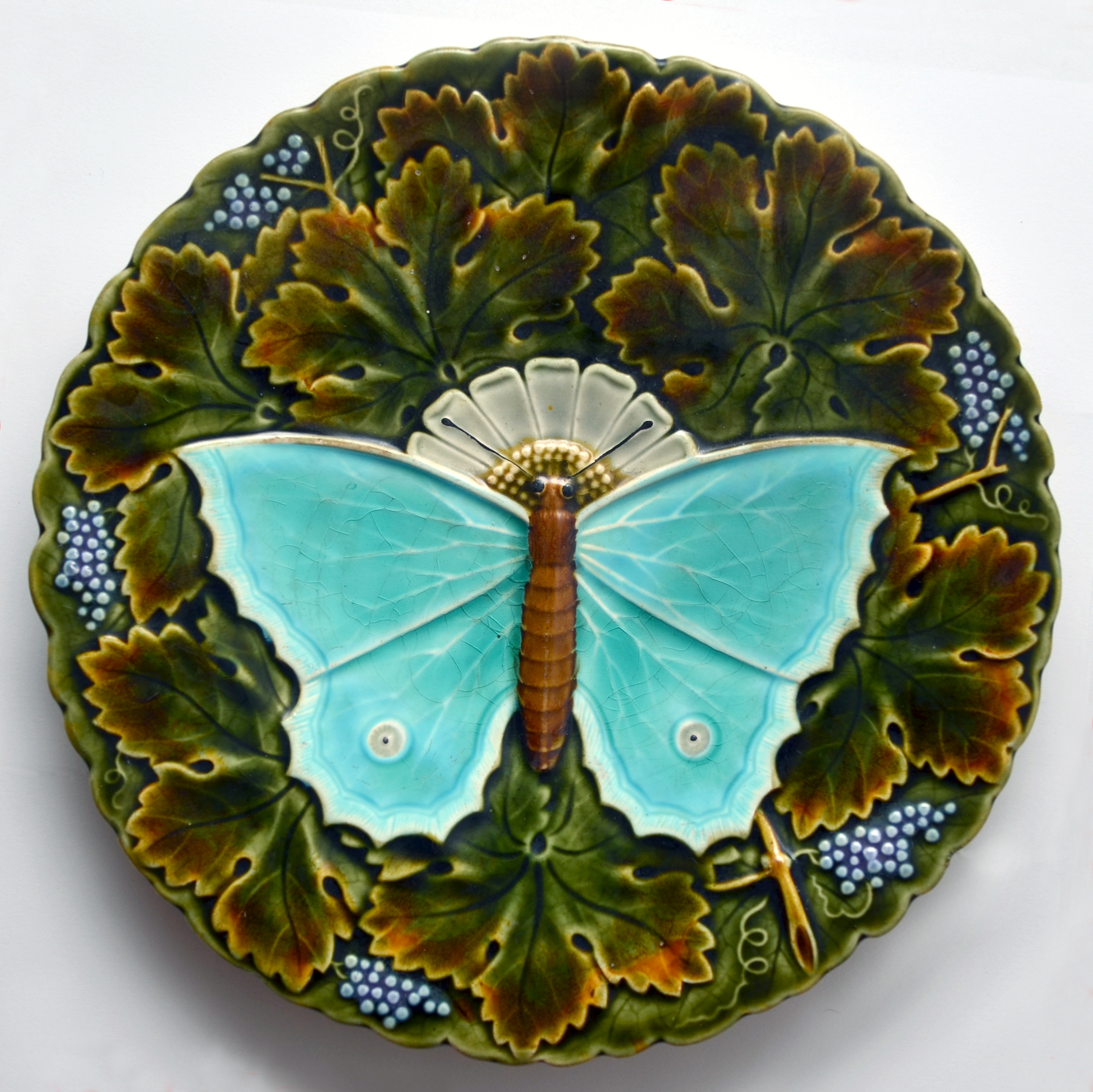 Talíř keramické firmy Gebrüder Schütz (Bratři Schützovi) z Olomučan z konce 19. století.